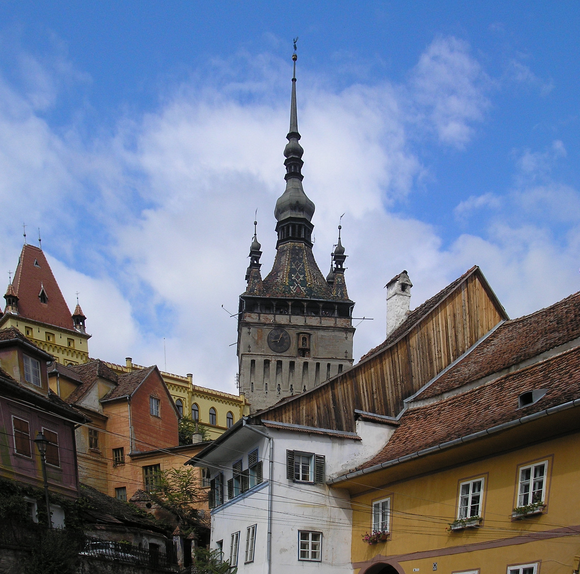 Uhrturm in Sighișoara